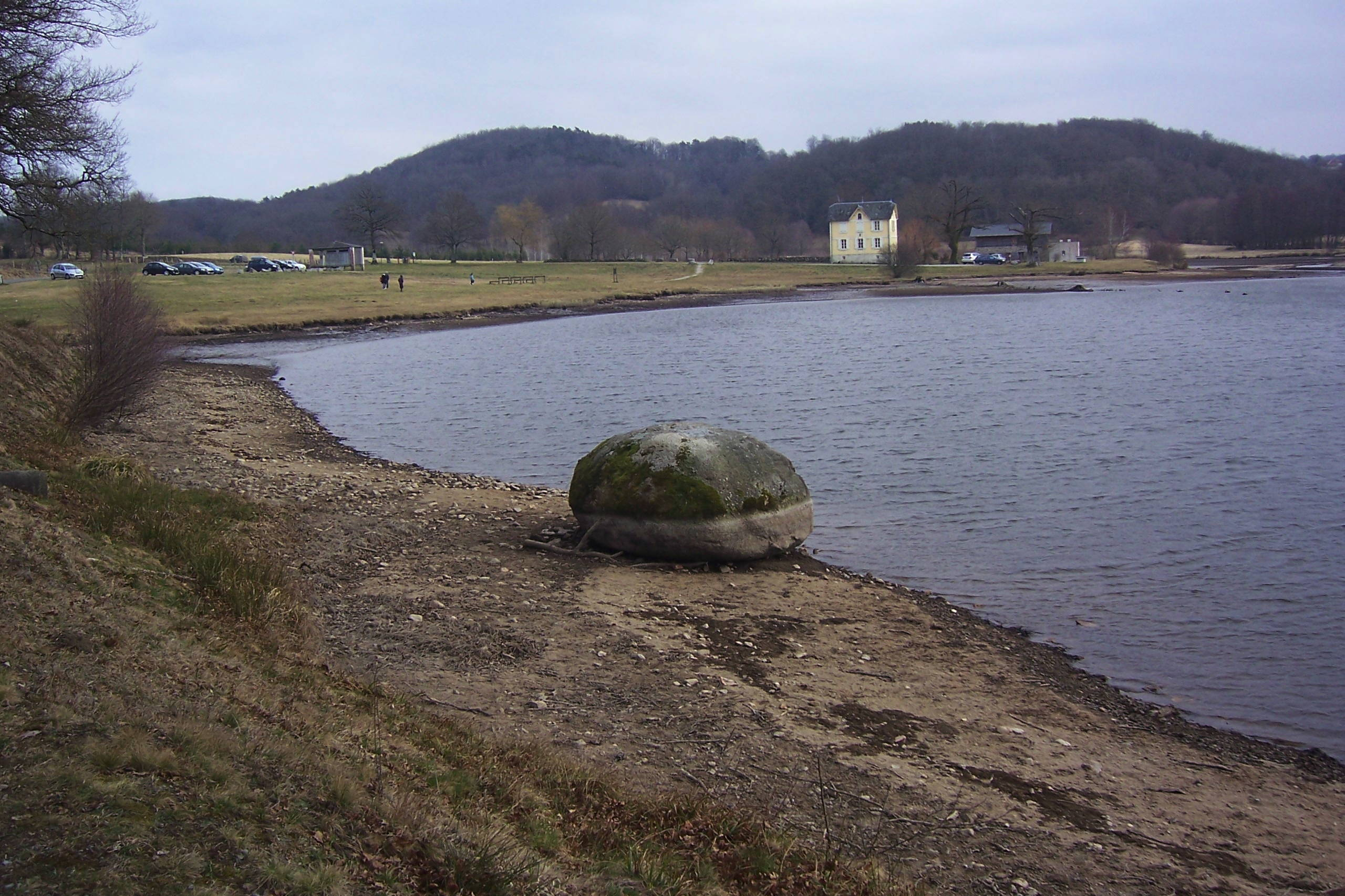 Rocher érodé sur la berge nord-est du lac du Tolerme